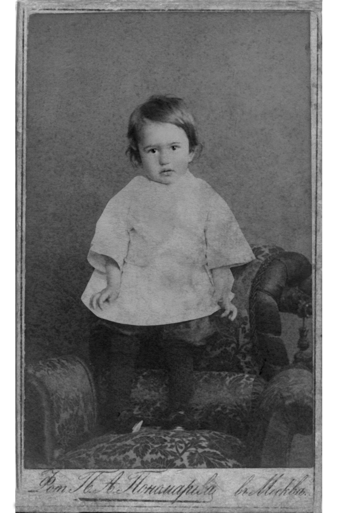 Фотография сделана в фотоателье Павла Алексеевича Пономарёва (Москва, Серпуховская пл., д. 50/28, дом Скворцова. Тел. 314-90).